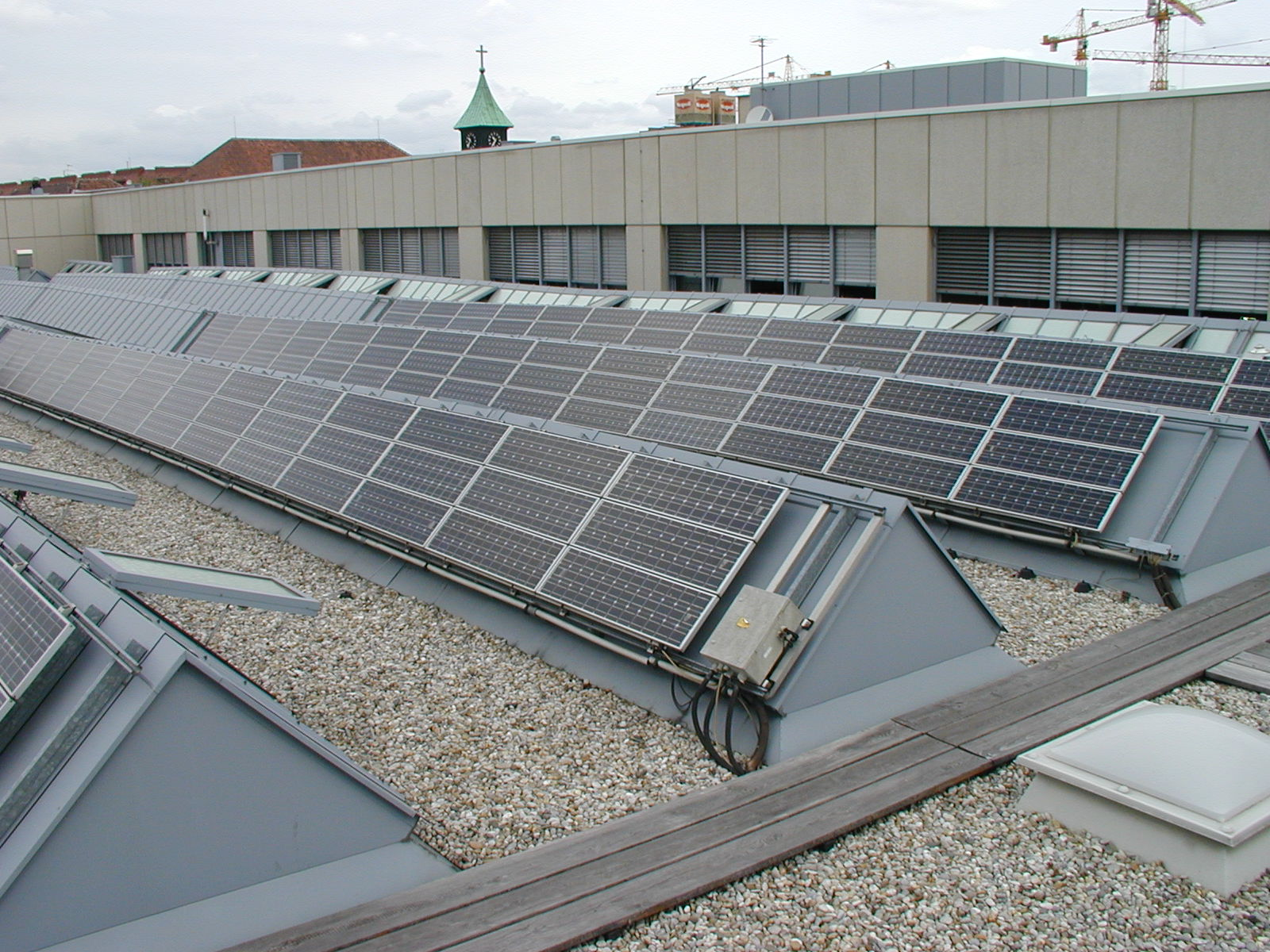 Photovoltaik-Anlage der HTL Wien 10